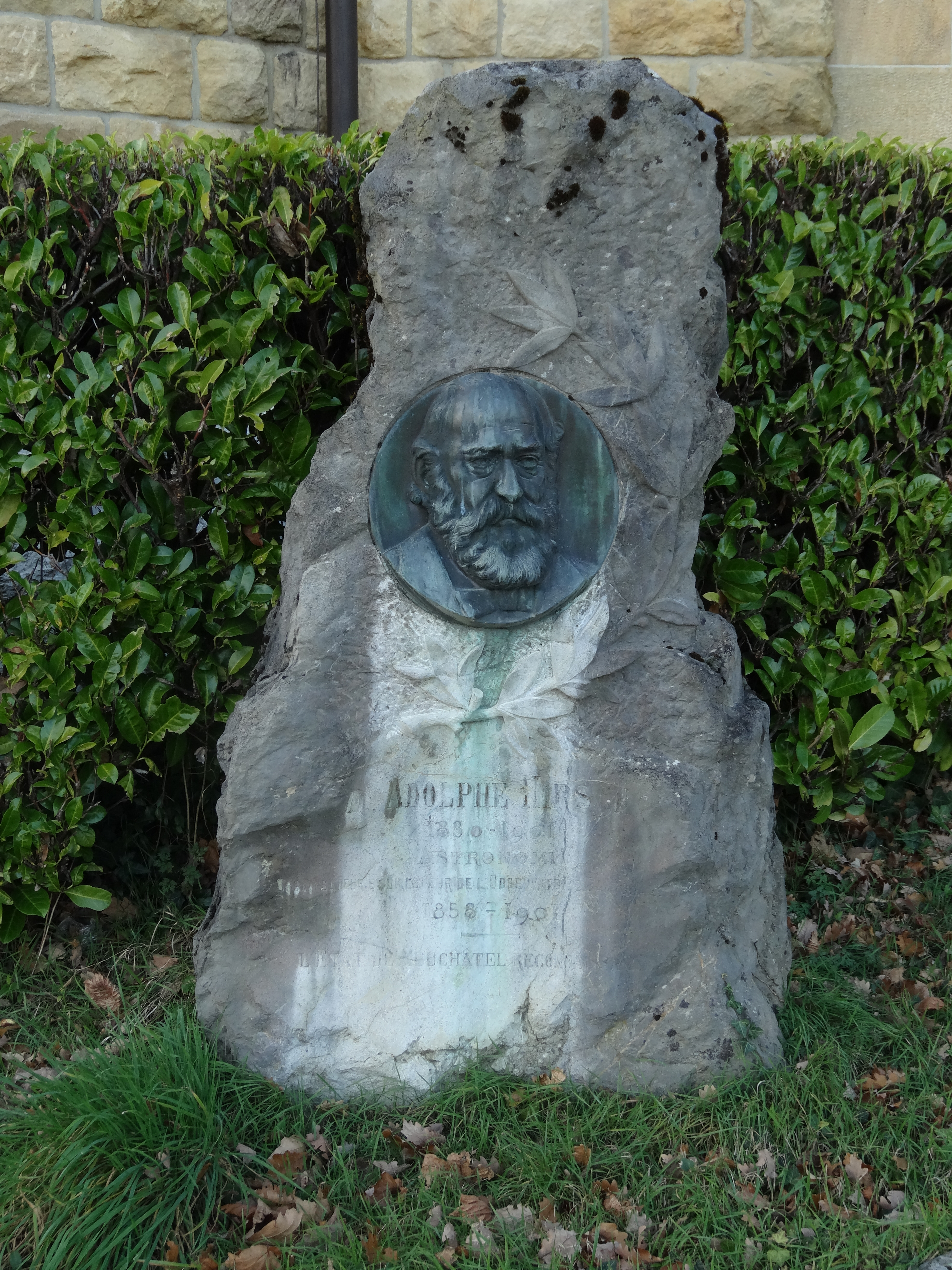 Neuchâtel, L'Observatoire, Pierre commémorative Adolphe Hirsch (1830-1901) devant le Pavillon Hirsch..